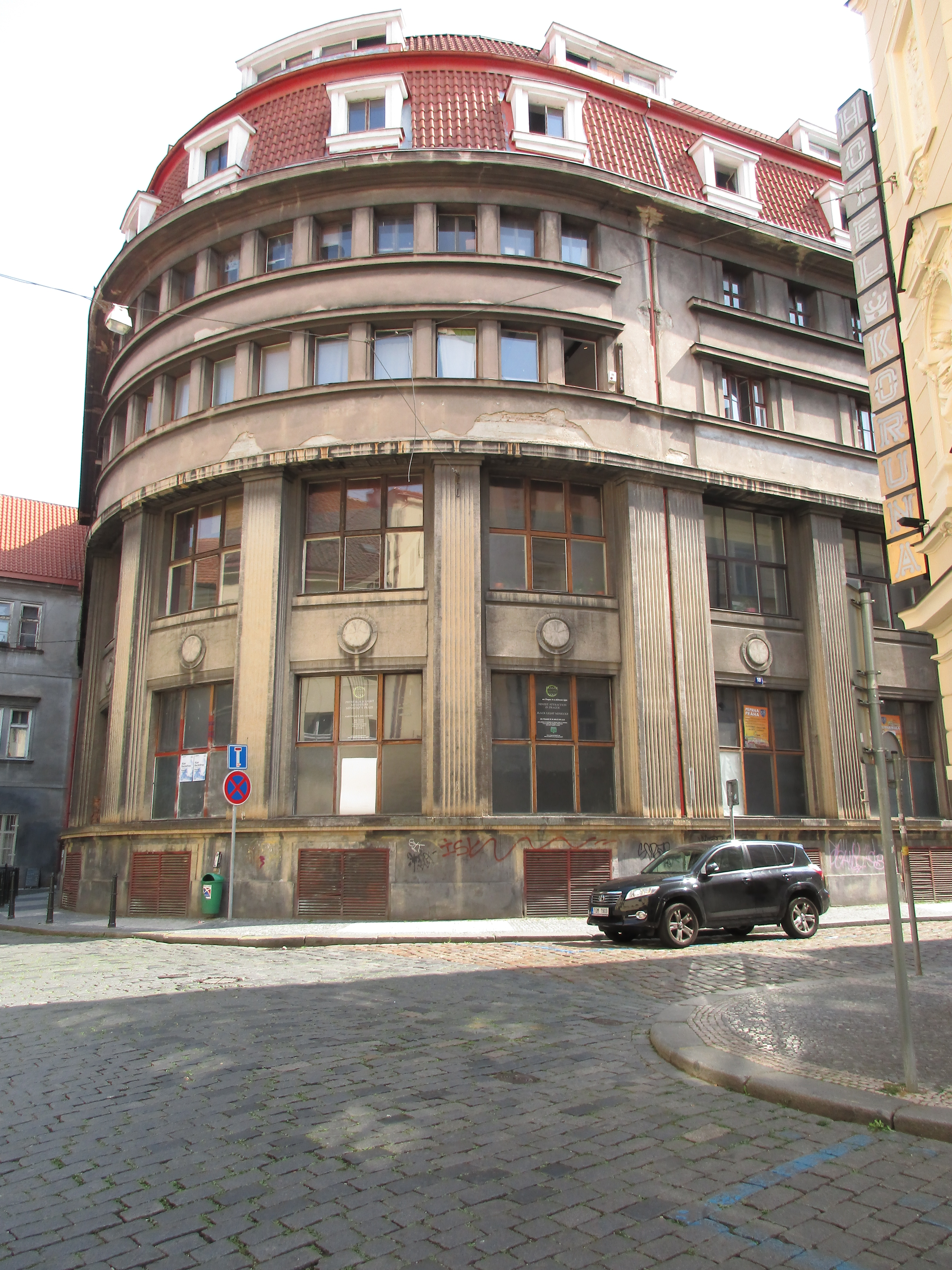 Nakladatelství a tiskárna Josef R. Vilímek, Opatovická 160/18, Praha 1-Nové Město.